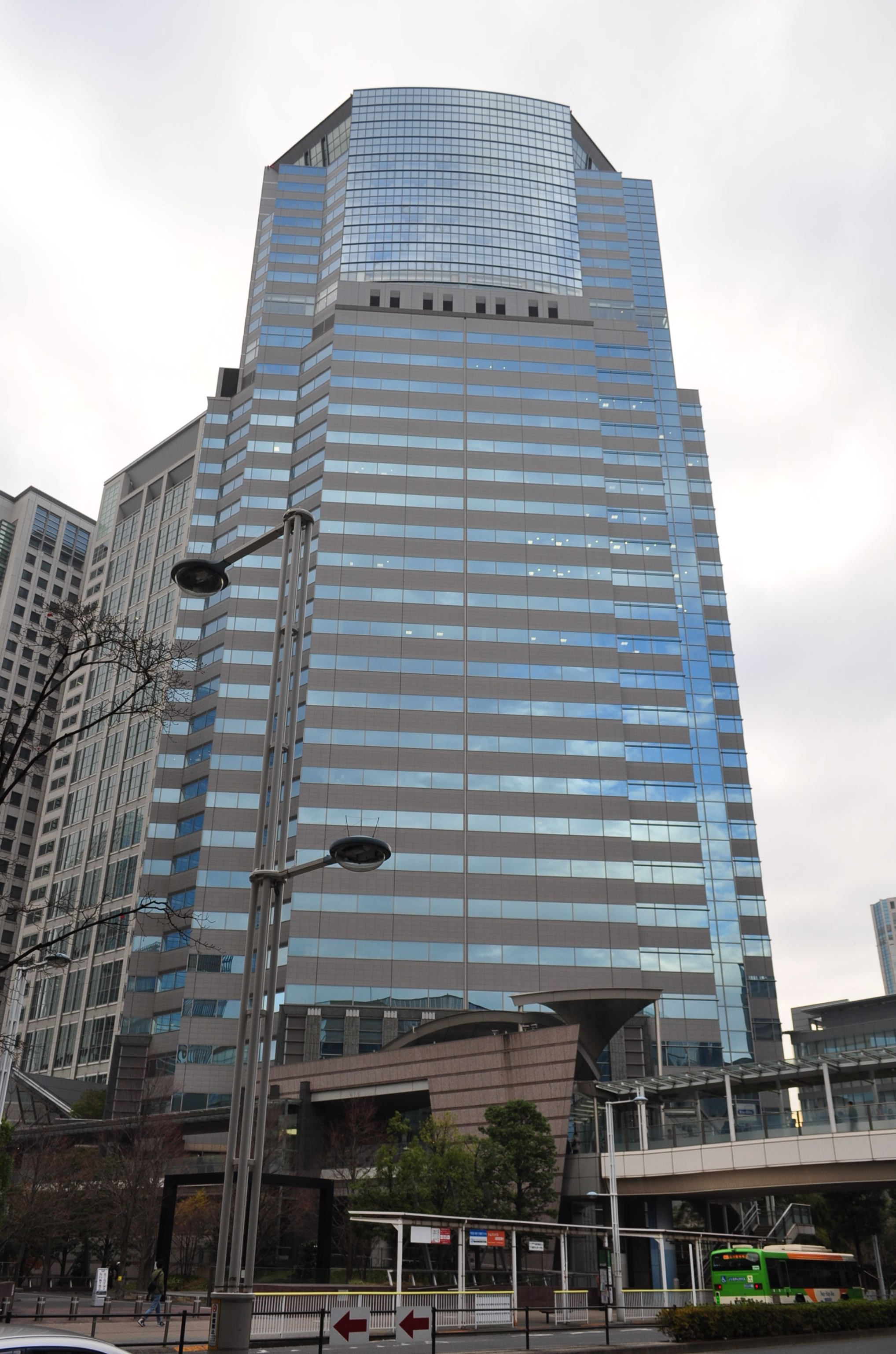 品川イーストワンタワー